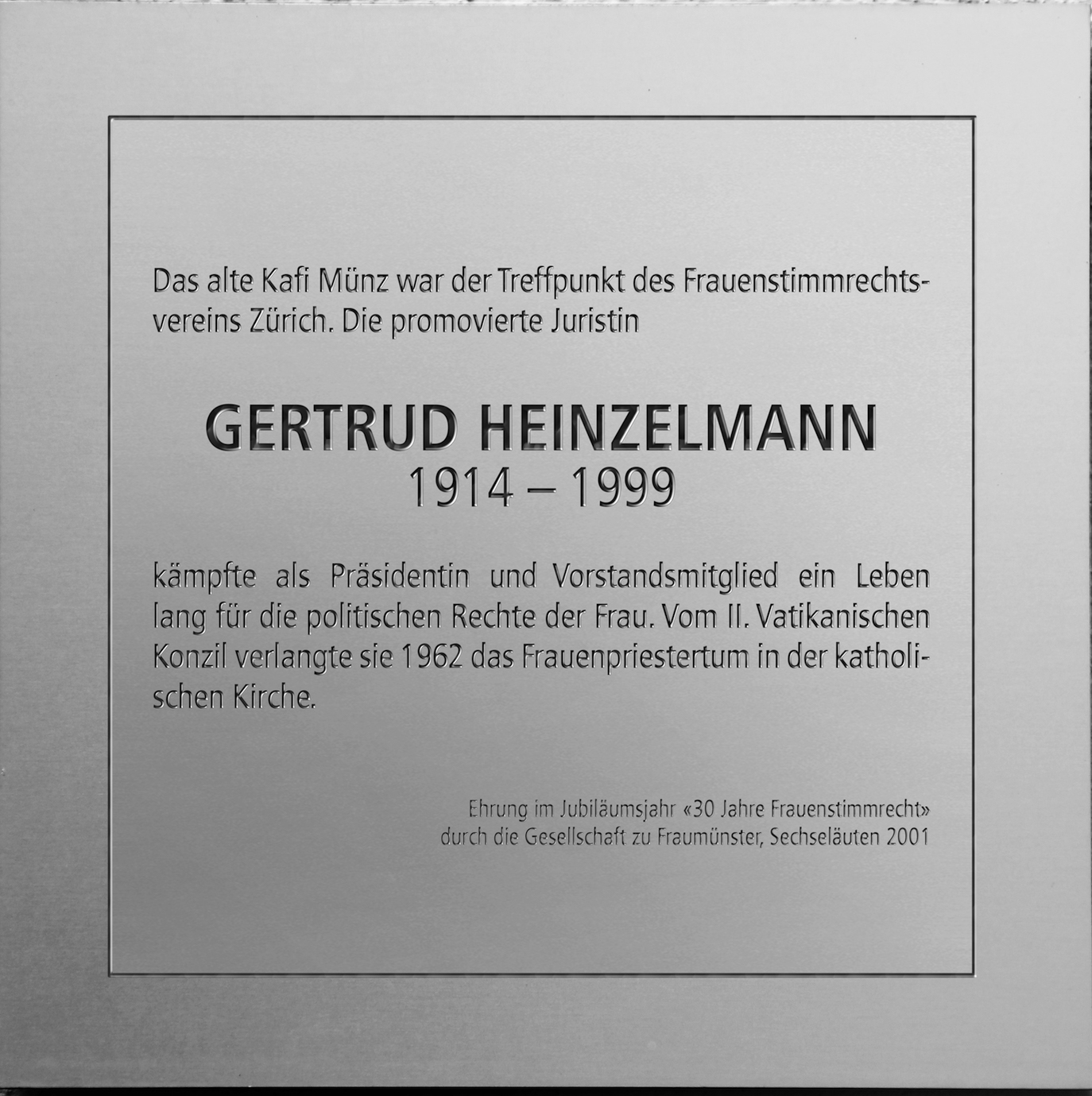 Gedenktafel